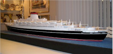 Andrea Doria liner Ship